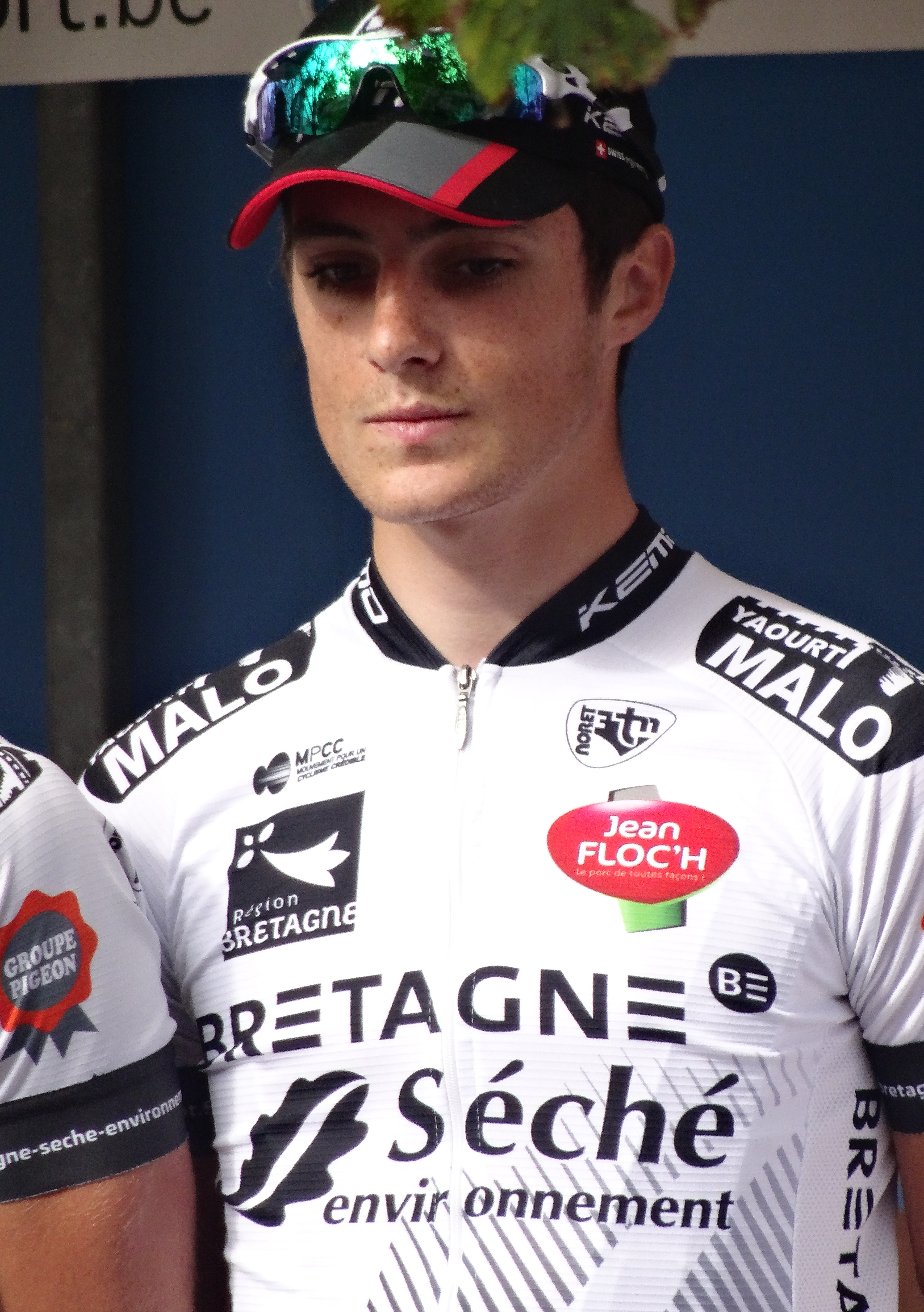 Reportage photographique réalisé le jeudi 2 octobre à l'occasion du départ de la première étape de l'Eurométropole Tour 2014 à La Louvière, Belgique.